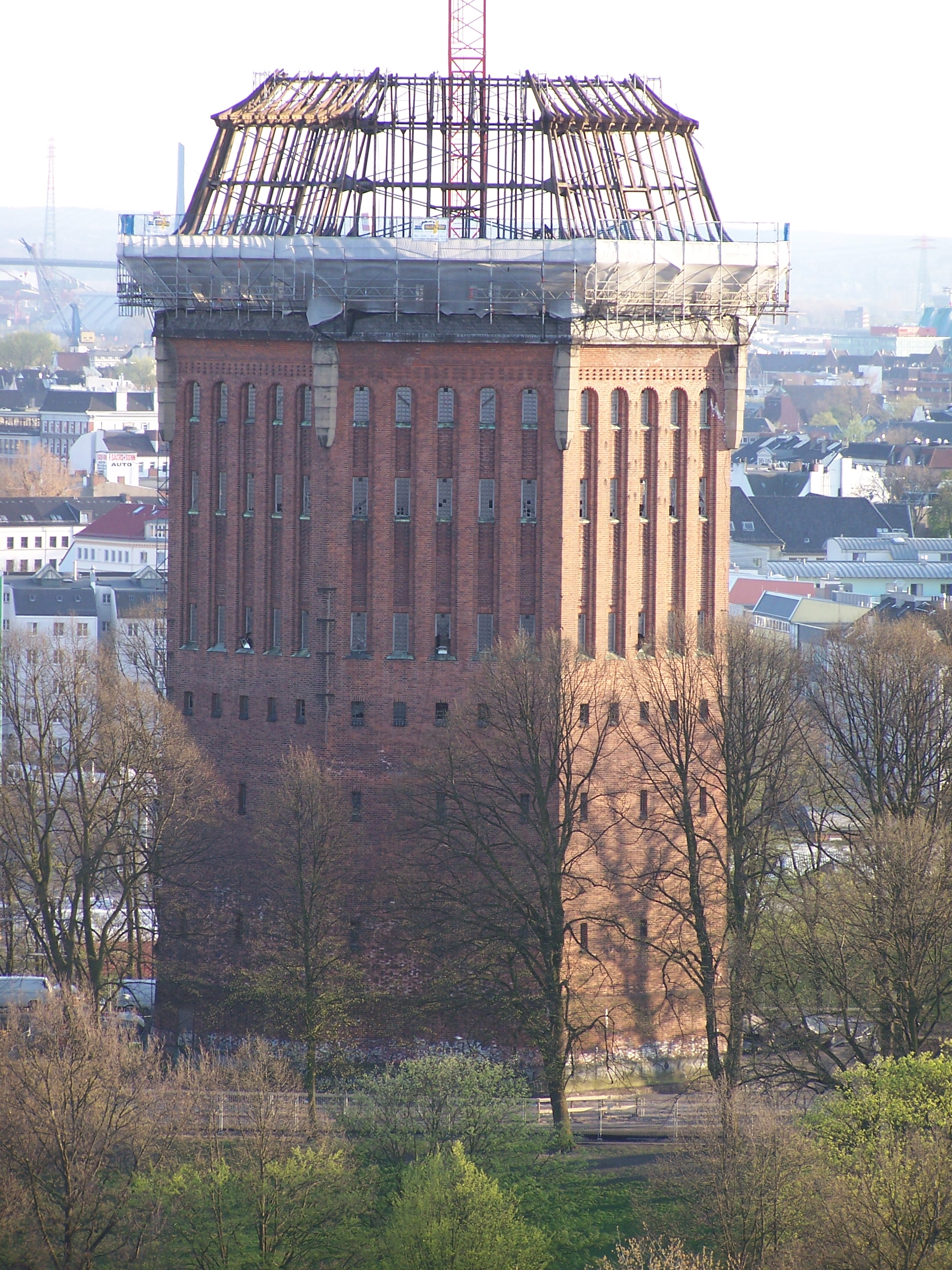 Wasserturm im Schanzenpark, Sternschanze, Hamburg, während des Umbaus zum Hotel This is a photograph of an architectural monument.